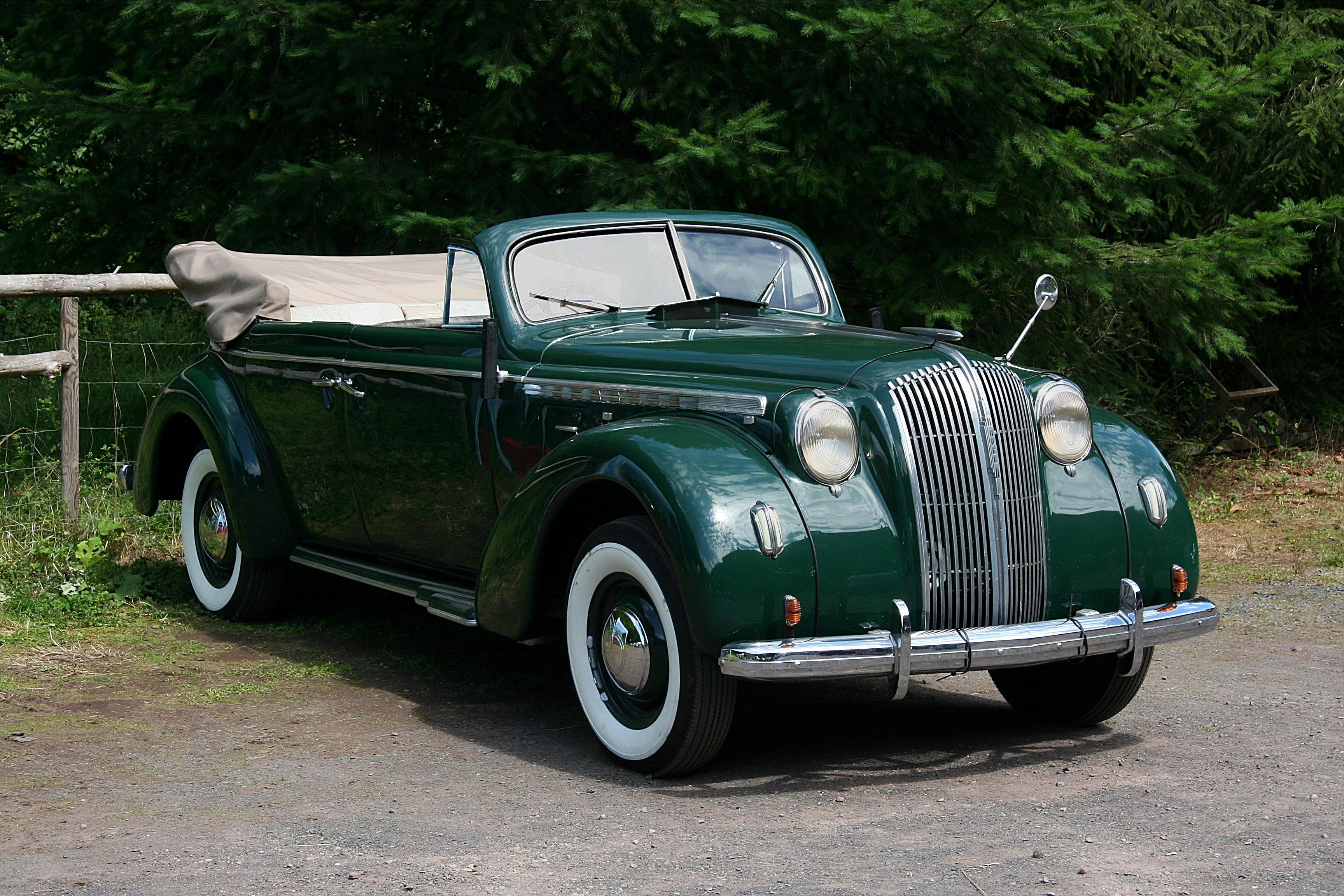 Opel Admiral (viertüriges Cabriolet), Bauzeit 1937 bis 1939, beim Oldtimmertreffen am Forellenhof, Vallendar